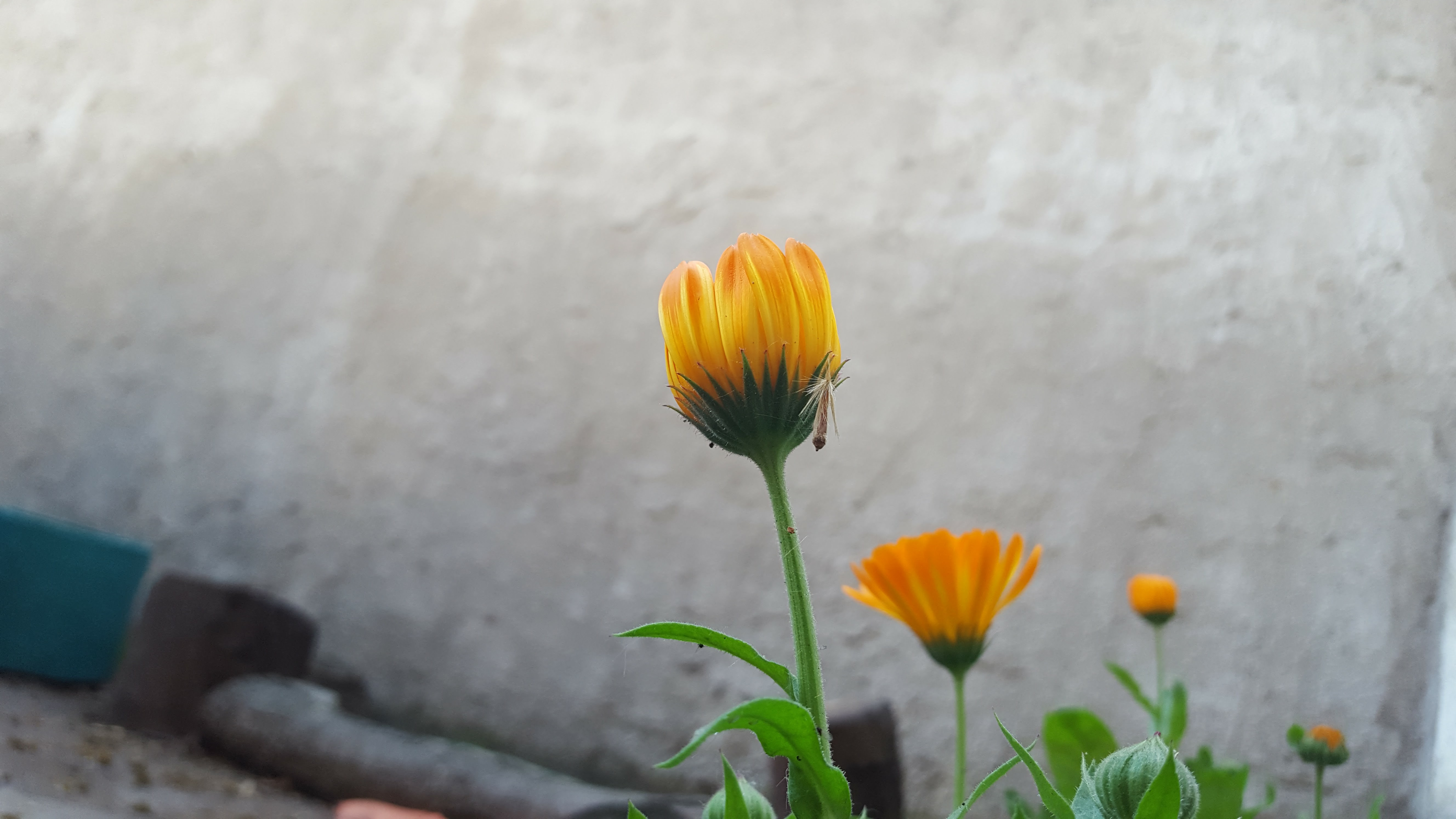 Se puede ver en desenfoque las cuatro flores de caléndula que fueron plantadas con la intención de ahuyentar plagas de la huerta que se encuentra a un lado. Se ven algunas florecidas y otras sin abrir su capullo.